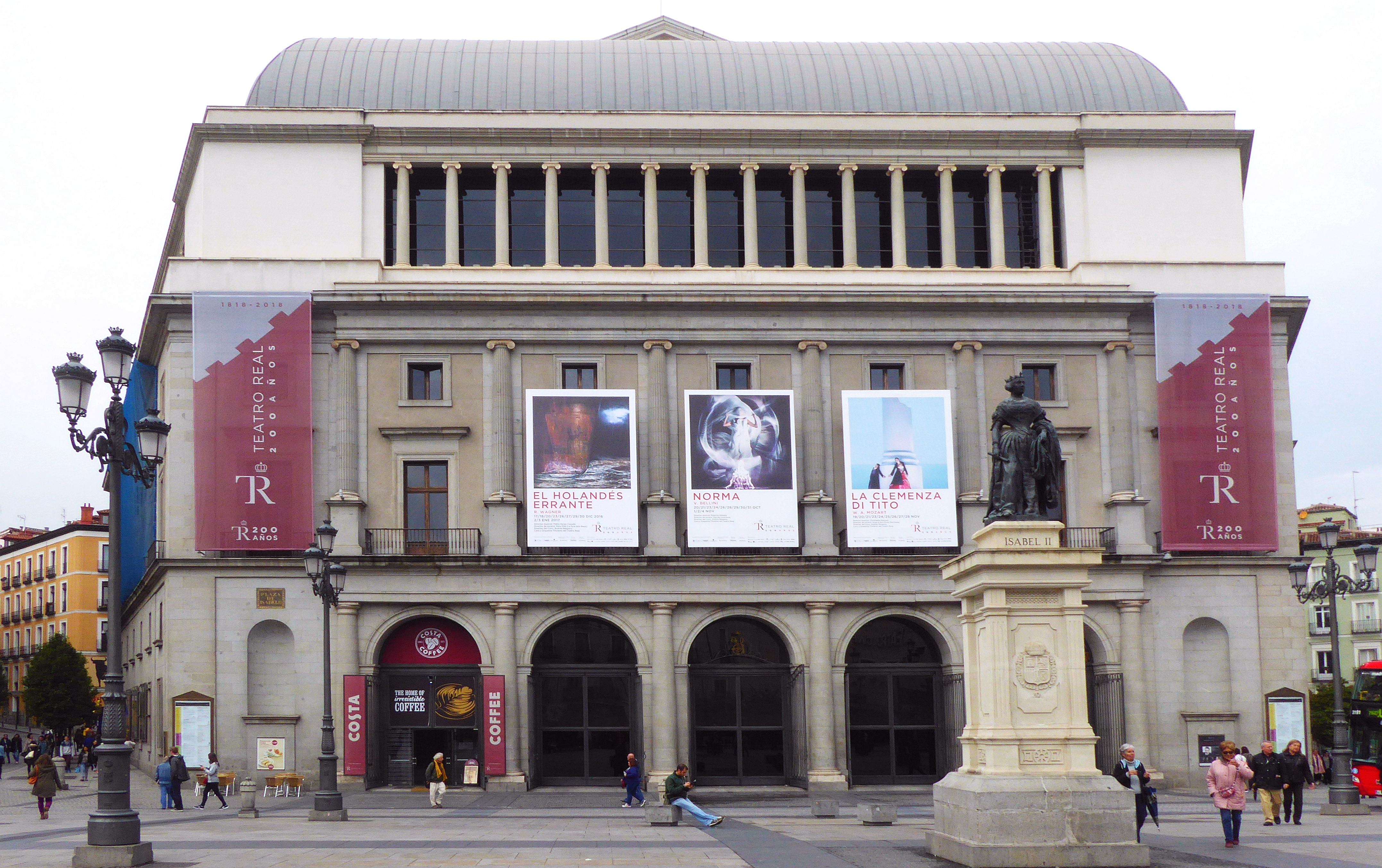 Das Teatro Reale oder Teatro Rela de Madrid von 1850 (Wiedereröffnung nach Leerstand und Grundsanierung 1997) an der Plaza de Isabel II ist ein Nachfolgebau des "Teatro de los Caños del Peral", das 1817 an gleicher Stelle abgerissen wurde. - In Spanien wurde lange diskutiert für das Teatro Reale an anderer Stelle einen großeren Neubau zu errichten, man entschied sich dann aber für die Sanierung des historischen Teatro Reale. Madrid, Spanien - Foto Wolfgang Pehlemann P1150196